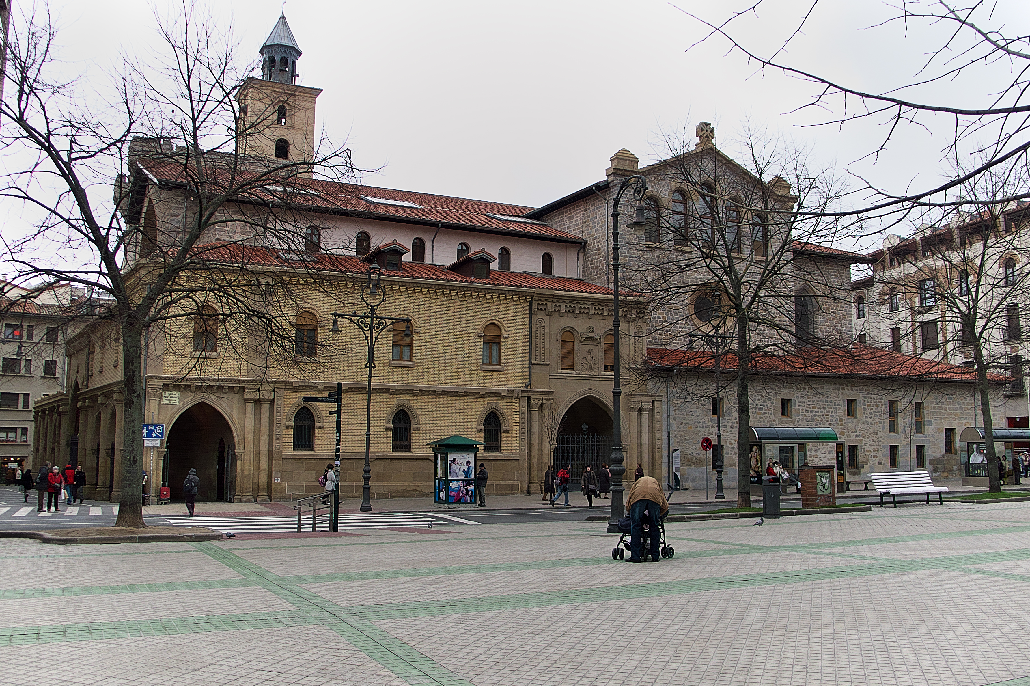 Edificio con orígenes en los siglos XII y XIII.